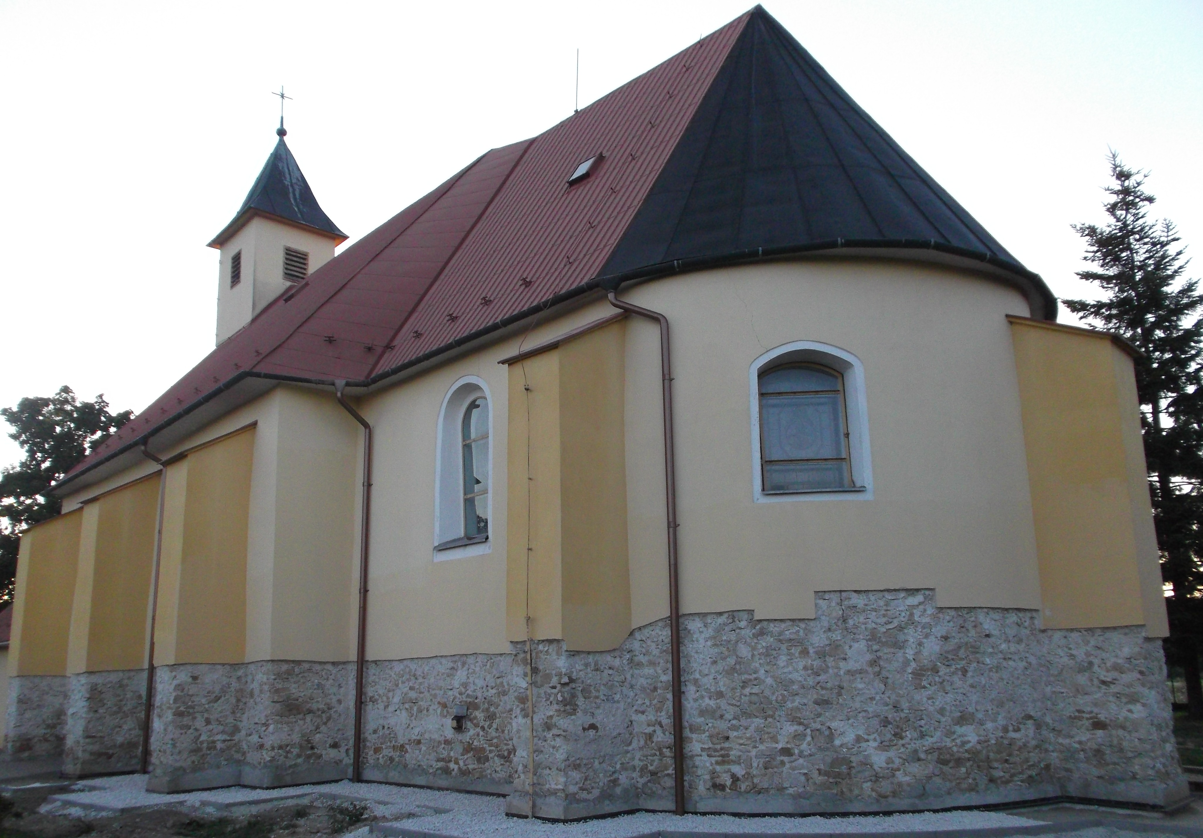 Horovce (okr. Púchov), Kostol Najsvätejšej Trojice